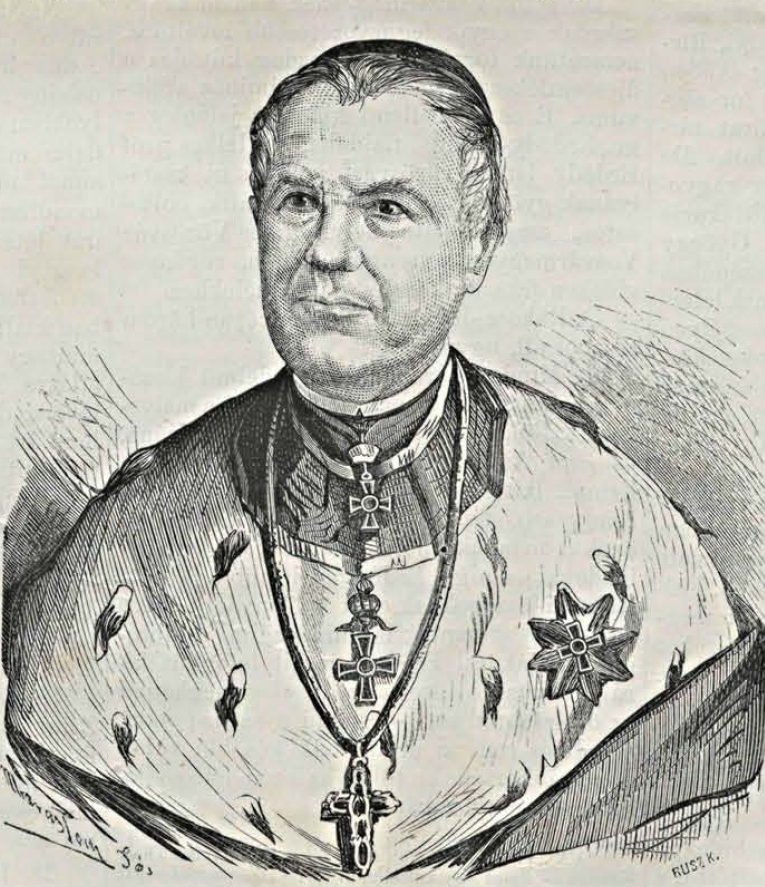 Lonovics József (1793–1867) püspök, egyháztörténész, a Magyar Tudományos Akadémia tagja. Rusz Károly metszete Marastoni József litográfiája alapján (Vasárnapi Ujság, 1867. március 24.)